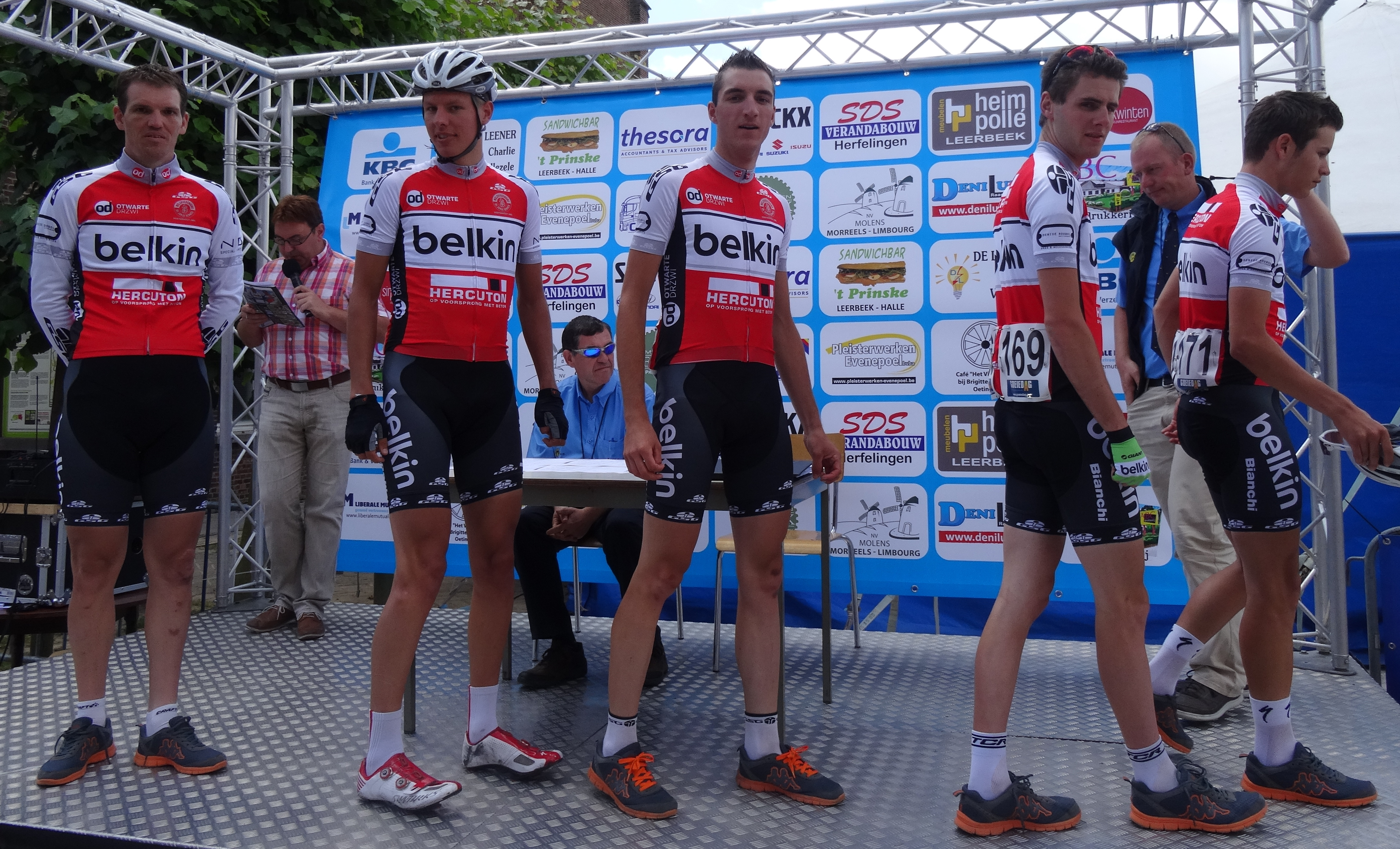 Reportage photographique réalisé le mercredi 25 juin à l'occasion du départ et de l'arrivée de l'Internationale Wielertrofee Jong Maar Moedig 2014 à Oetingen (Gooik), Belgique.